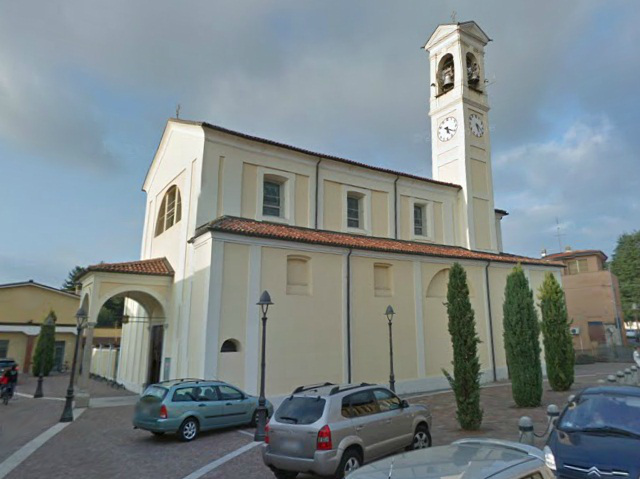 La chiesa parrocchiale di Sant'Antonio a Cassinetta di Lugagnano (MI) - Italy